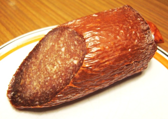 Pferdesalami aus Pferdefleisch einer Pferdemetzgerei im rheinischen Eschweiler (Original text: selbst gekauft und fotografiert)